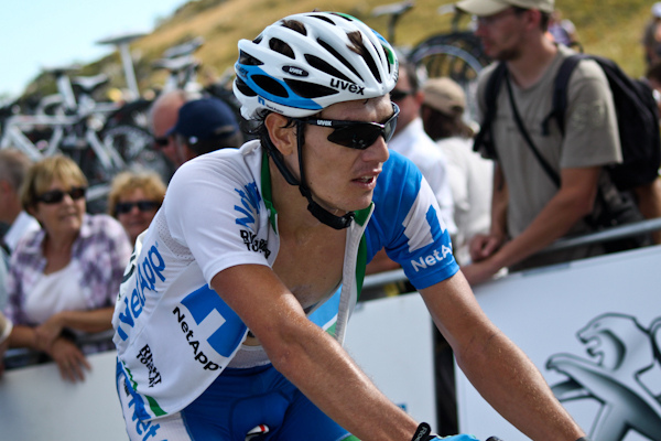 4e étape (Col du Grand Colombier) du Tour de l'Ain 2011